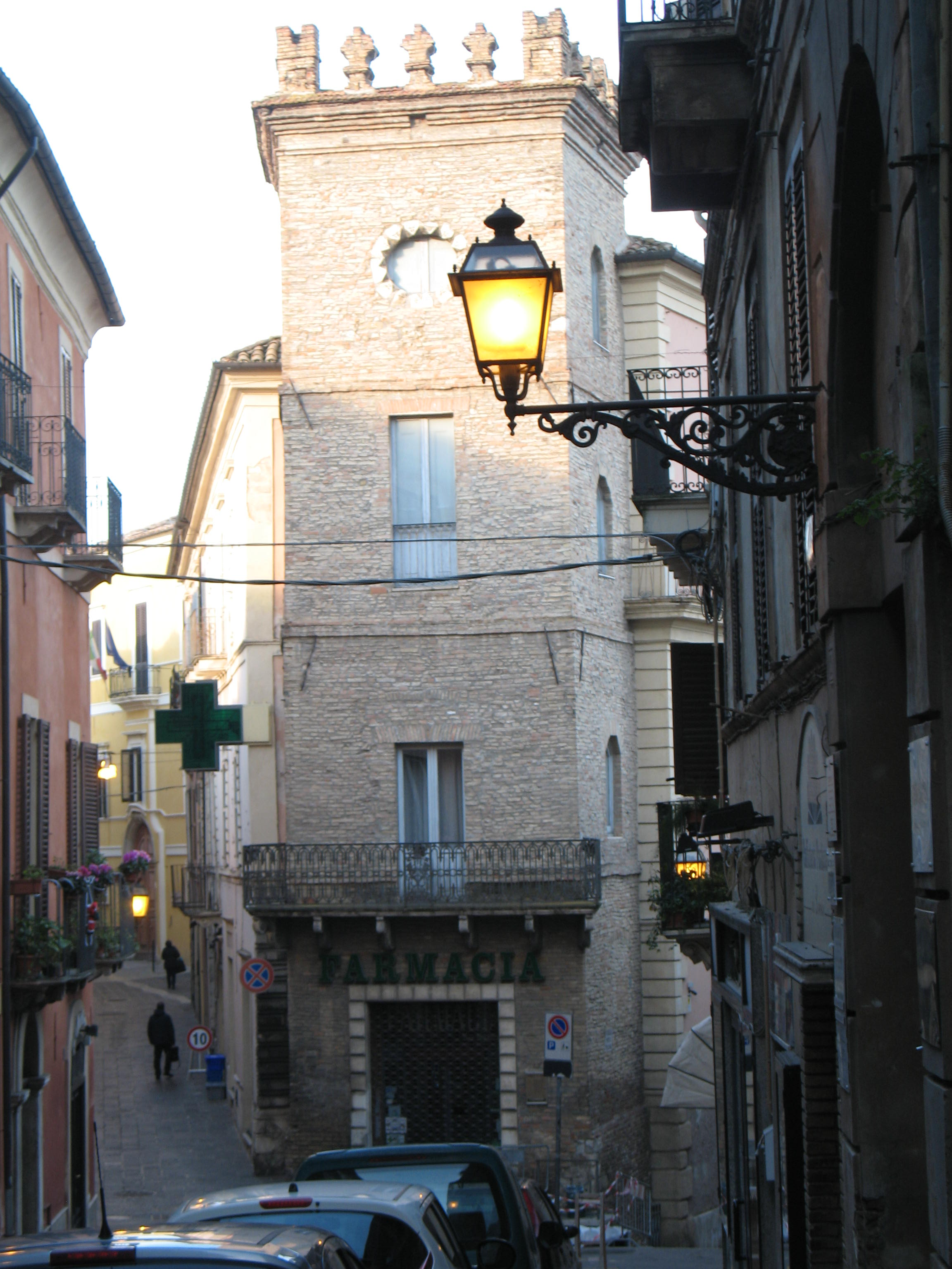 La foto ritrae la trecentesca torre di Palazzo Toppi, dimora nobiliare del Rione Trivigliano di Chieti